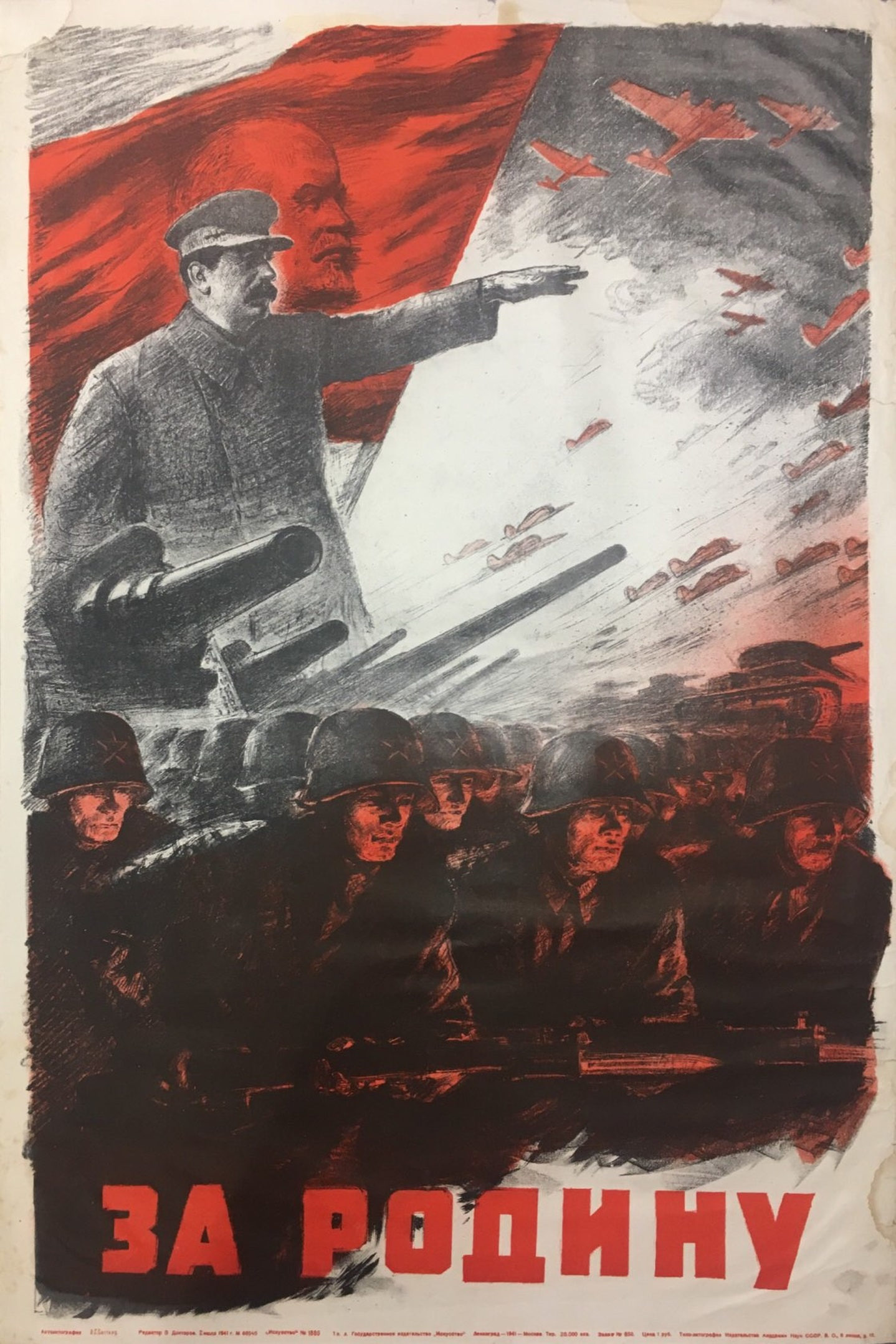 1941. За Родину.jpg